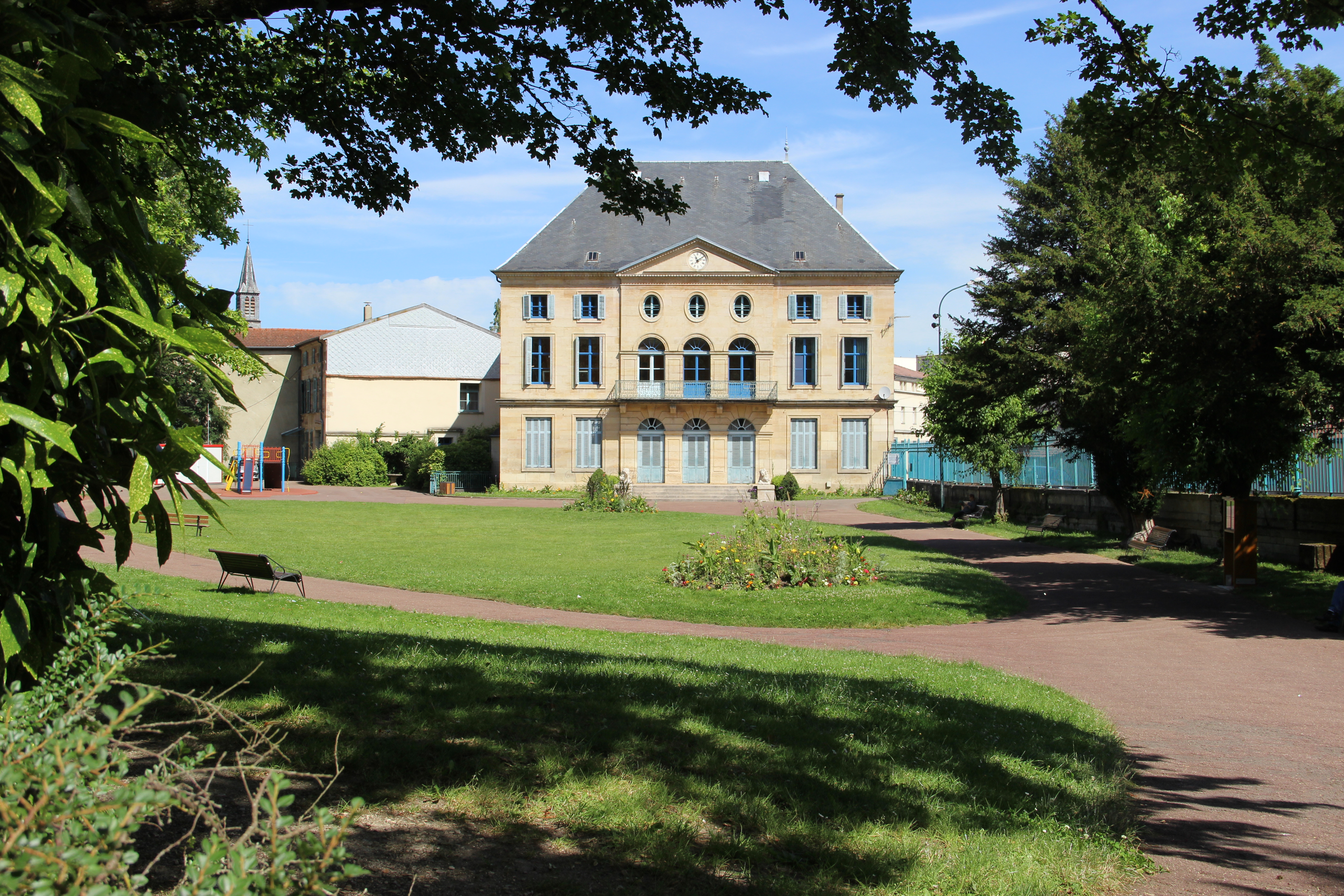 Le parc et la mairie